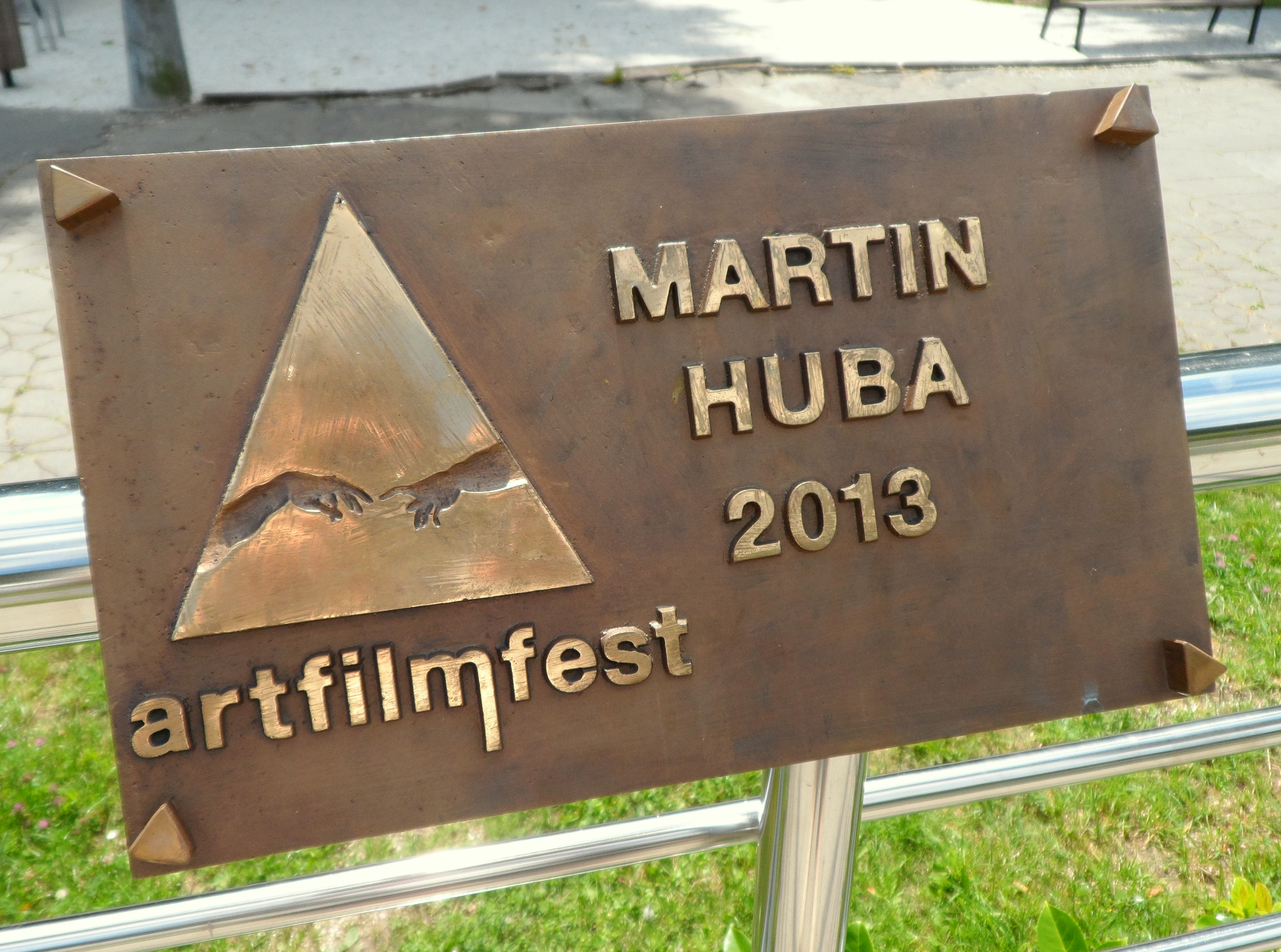 Mosadzná plaketa: „HERCOVA MISIA“ (Actor‘s Mission Award). Medzinárodný filmový festival Art Film Fest, Trenčianske Teplice 2013